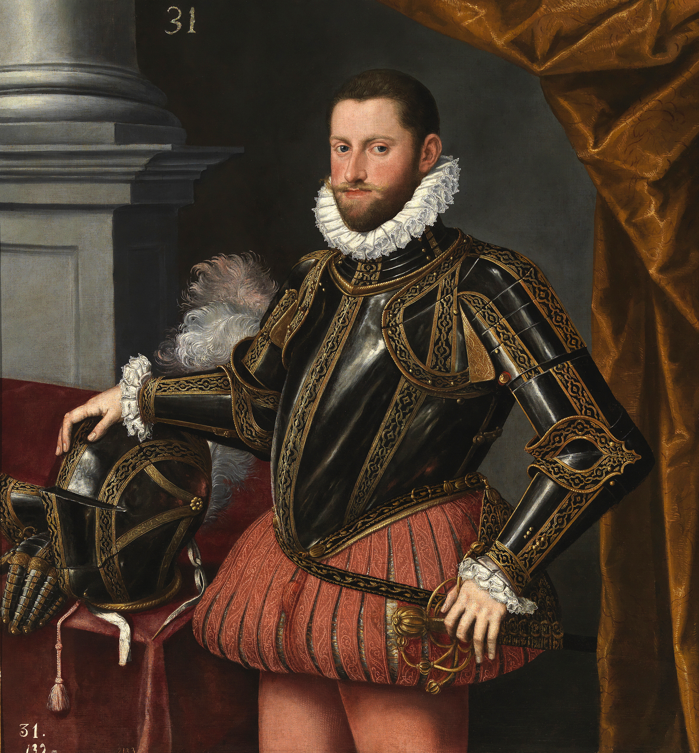 Retrato del archiduque Ernesto de Austria (1553-1595), que fue hijo del emperador Maximiliano II de Habsburgo y de la emperatriz María de Austria y Portugal, hija a su vez del emperador Carlos I de España.